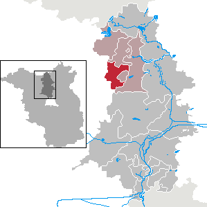 Sonnenberg in Brandenburg (Country) - District Oberhavel